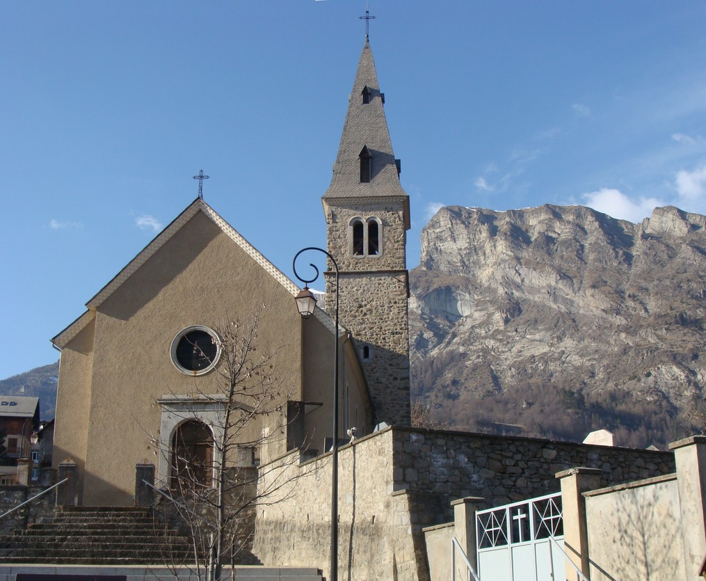 L'église de Saint-Jean, commune de Saint-Jean-Saint-Nicolas (Hautes-Alpes). Au second plan, le Palastre.